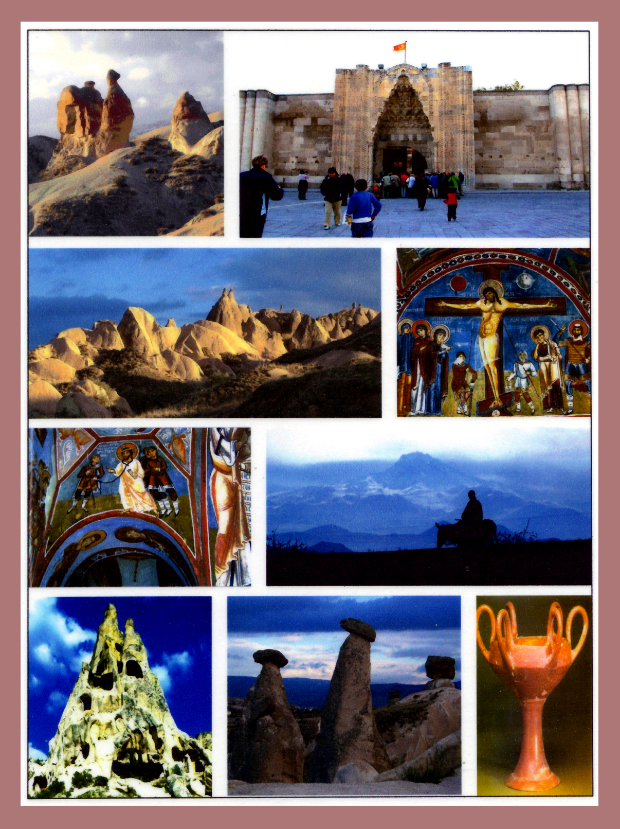 Kappadókia/Göreme Nemzeti Park (montázs), Törökország